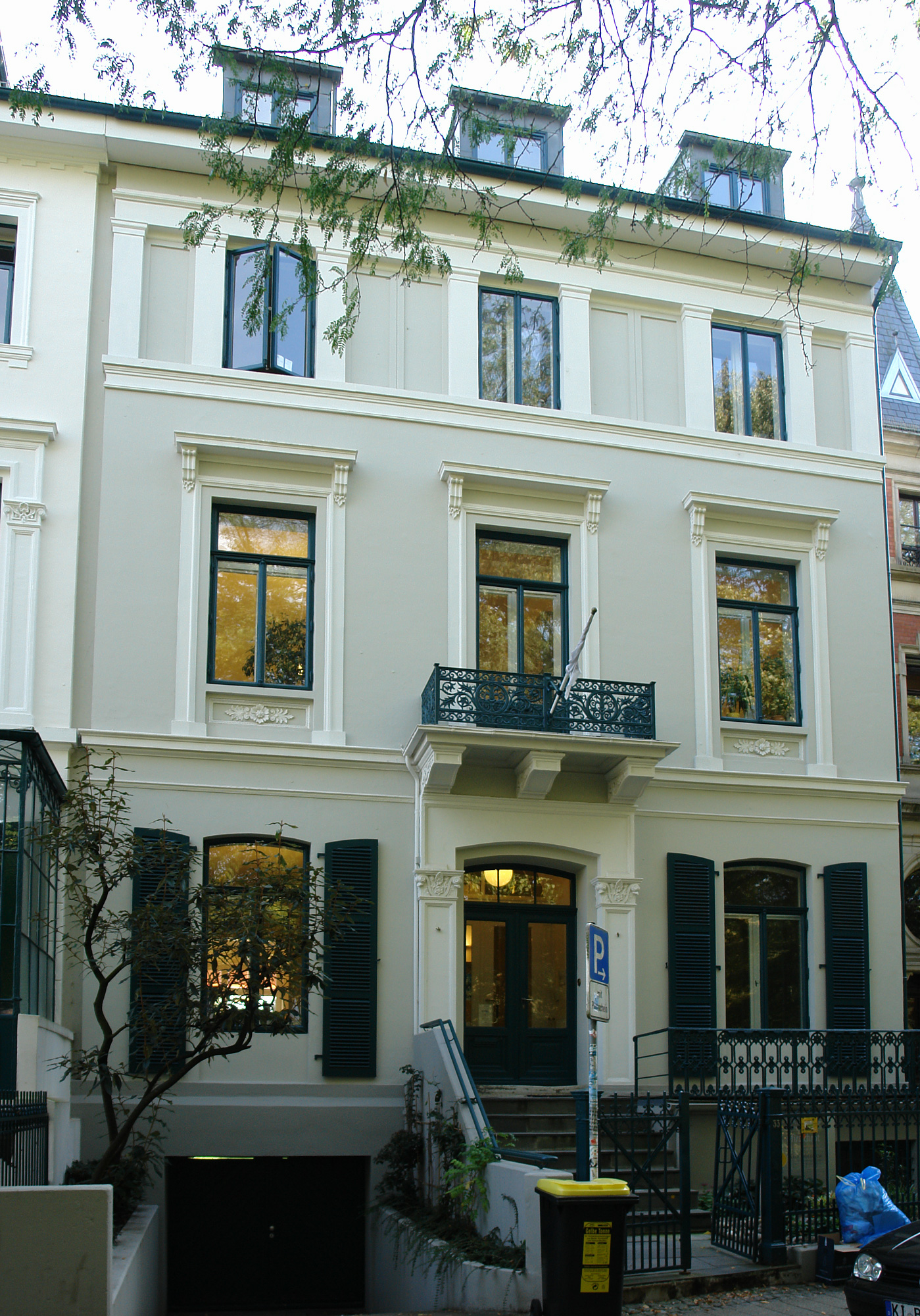 Wohnhaus in Bremen, Contrescarpe 33.Das abgebildete Objekt ist ein geschütztes Kulturdenkmal in der Freien Hansestadt Bremen, mit der Nr. 0286 beim Landesamt für Denkmalpflege registriert.